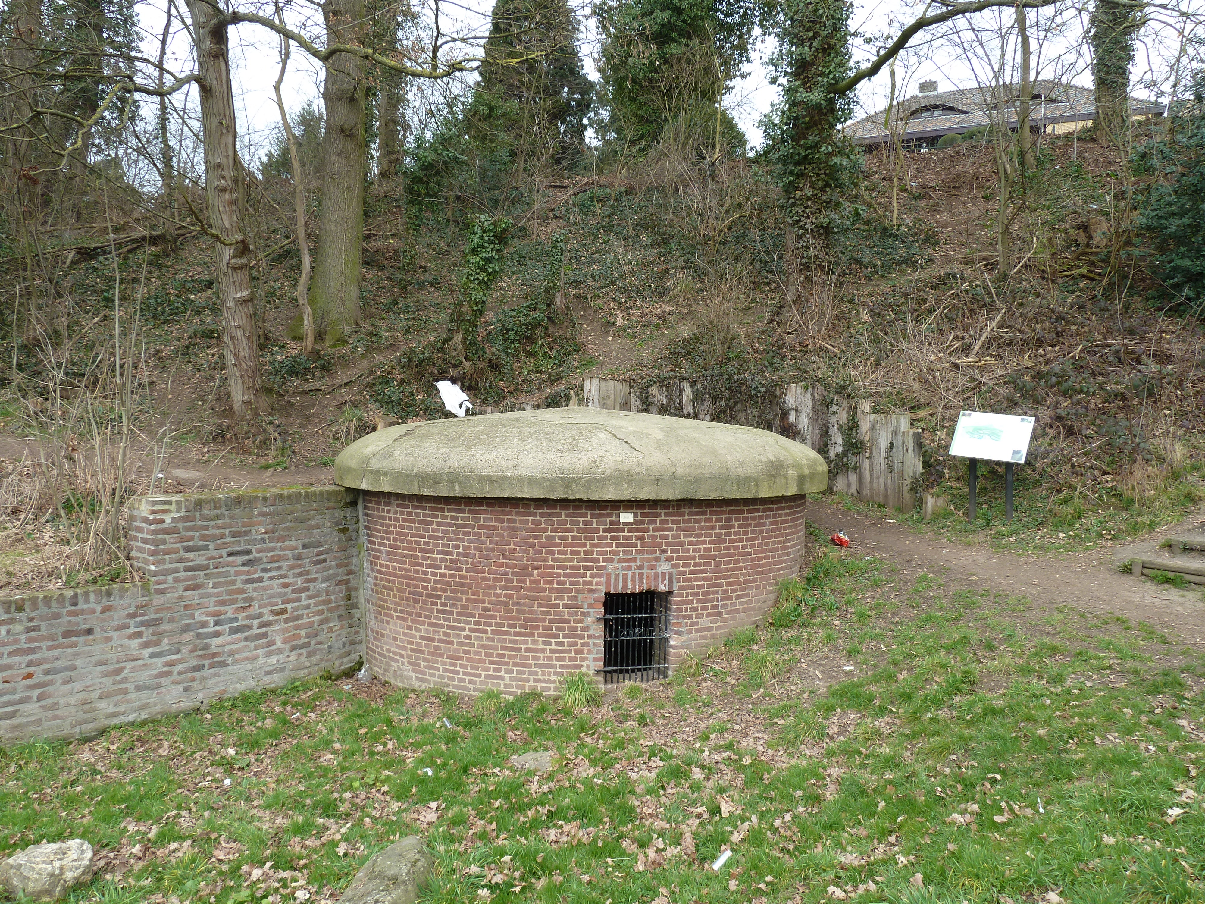 Zonput, Stein, Limburg, Nederland